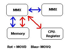 MOV-Instruction